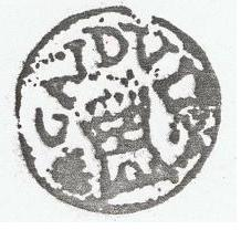 Sello del Ayuntamiento de Gandul (Sevilla, España)